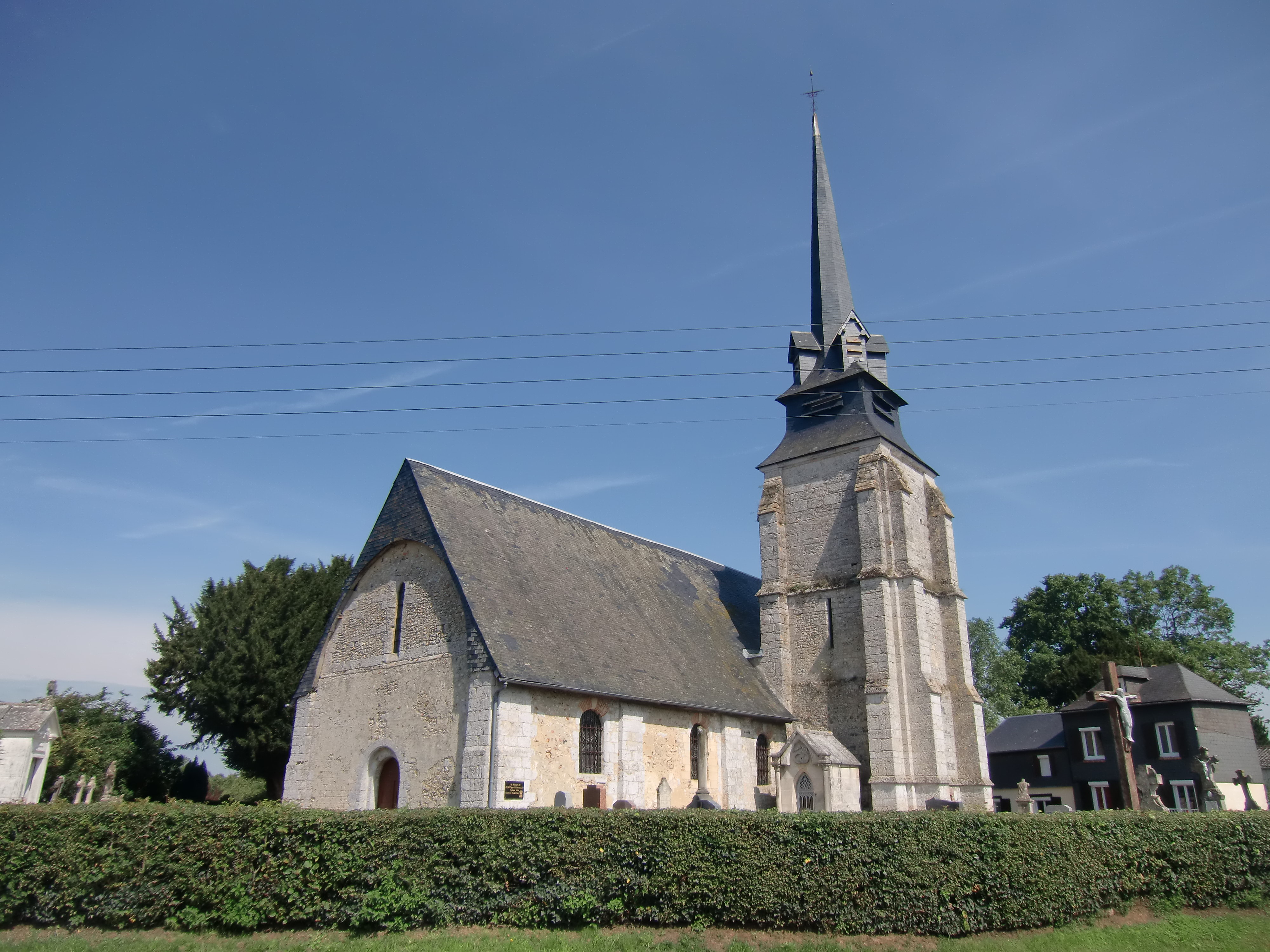 Église paroissiale de La Lande-Saint-Léger (Eure, Normandie, France)